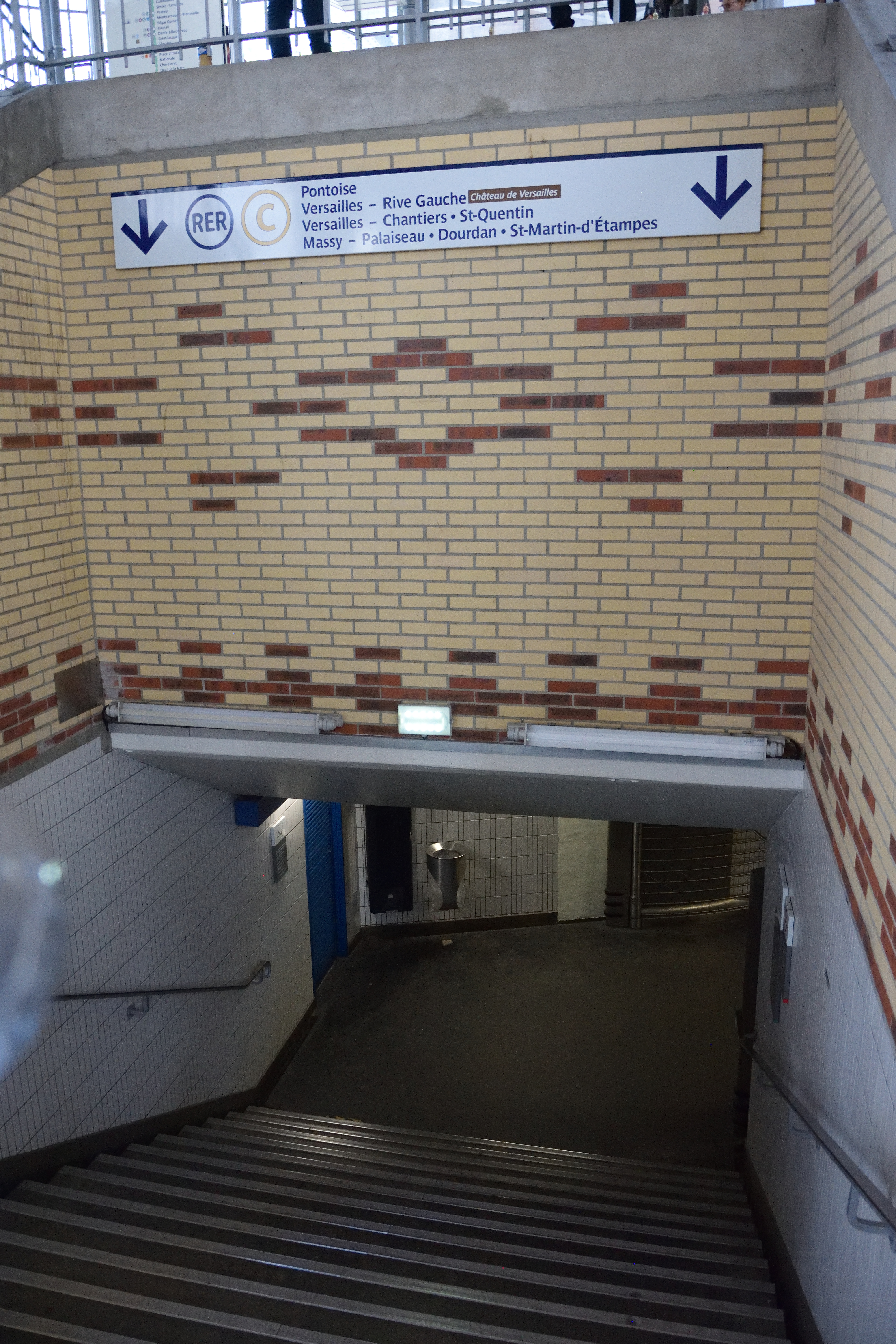 Entrée souterraine vers la gare de Champ de Mars - Tour Eiffel sur la ligne RER C, à Paris.